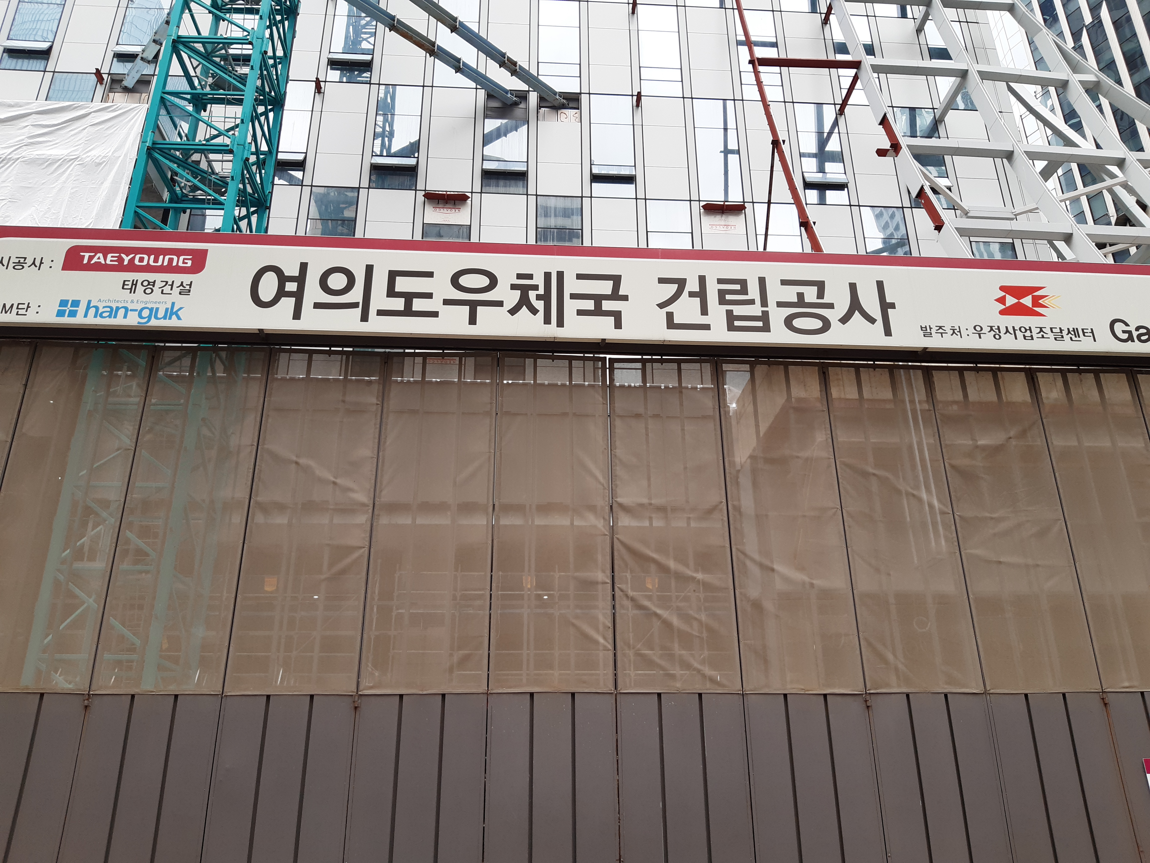 여의도우체국(공사중)